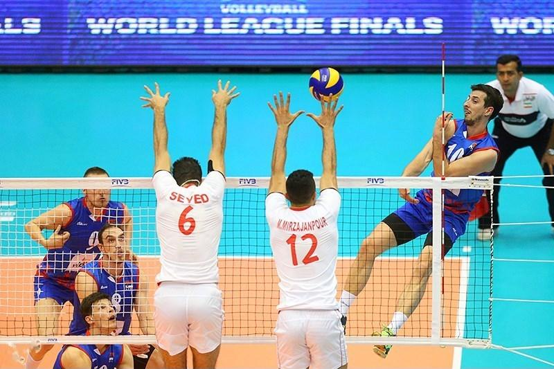 لیگ جهانی والیبال-دیدار ایران و صربستان